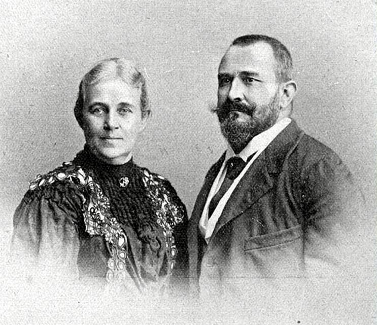 De Resident van Rembaag en Mevrouw Gonggrijp, 1913